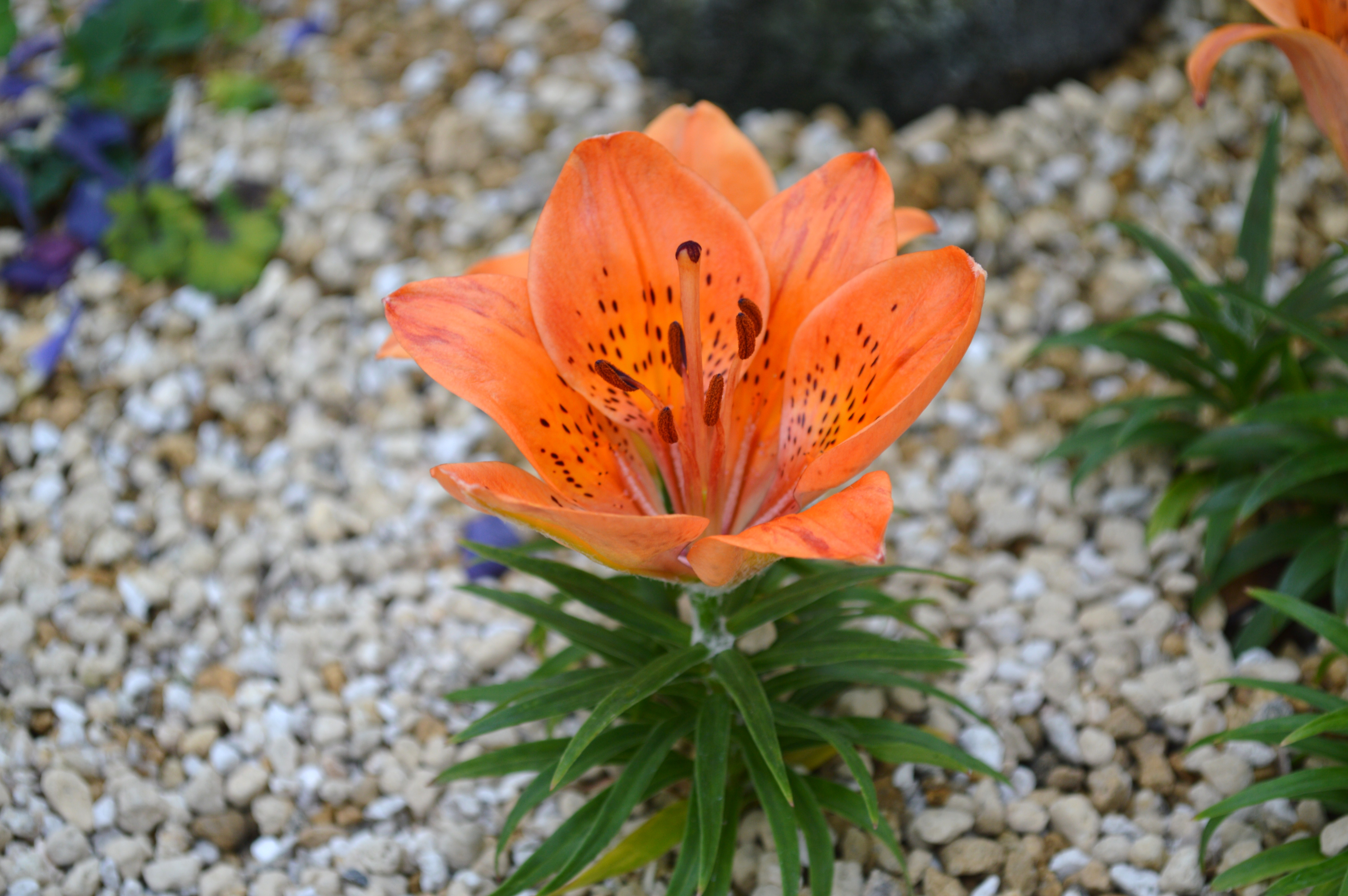 エゾスカシユリ礼文姫（れぶんひめ） エゾスカシユリの矮性選別種。京都府立植物園観覧温室で撮影。草丈10cm未満。